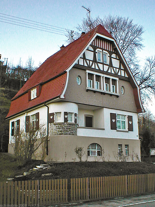 Villa Binder nahe der früheren Ziegelei längs der Neckartalstraße, Böckinger Straße 104 in Heilbronn-Neckargartach